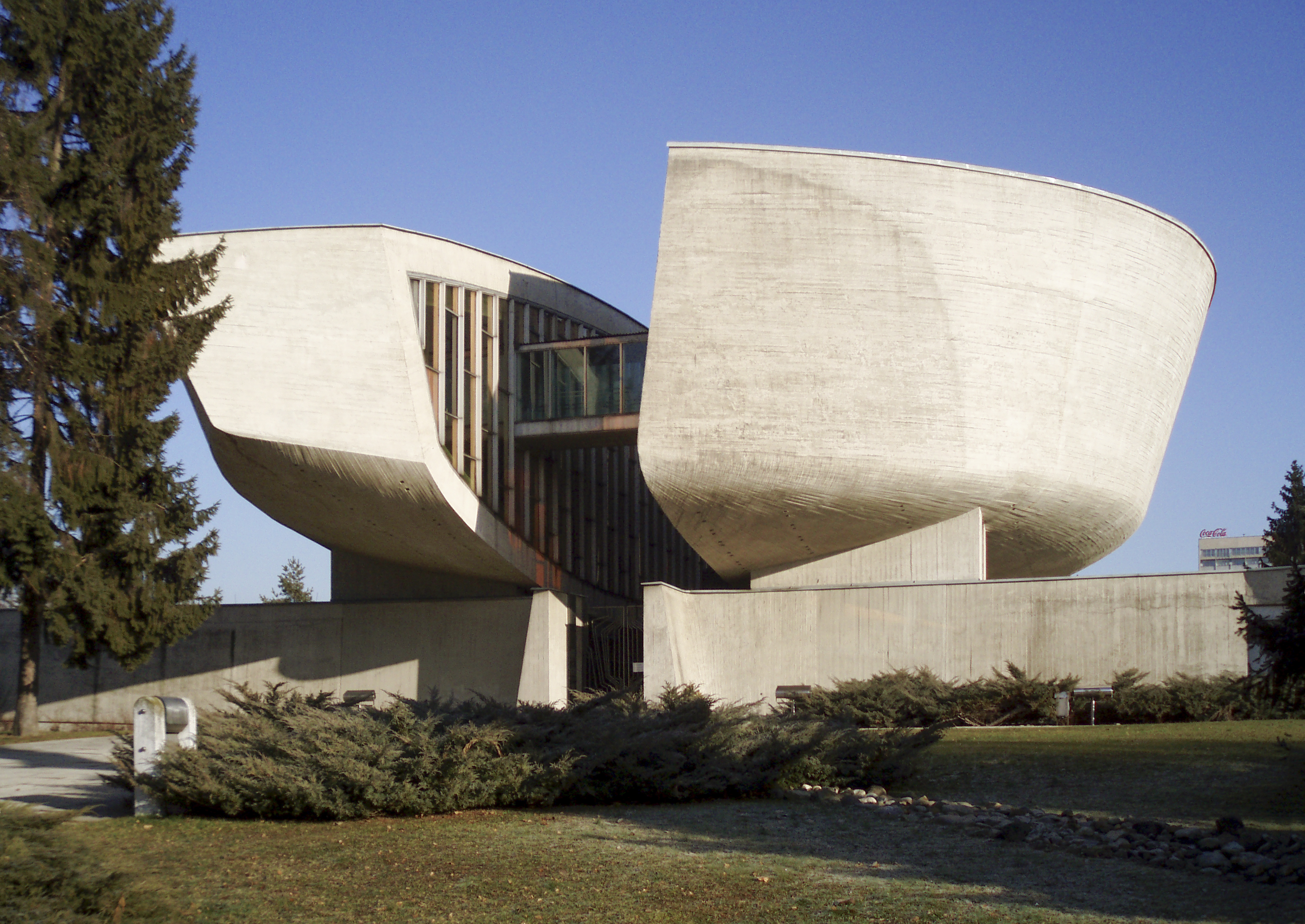 Pamätník Slovenského národného povstania v Banskej Bystrici